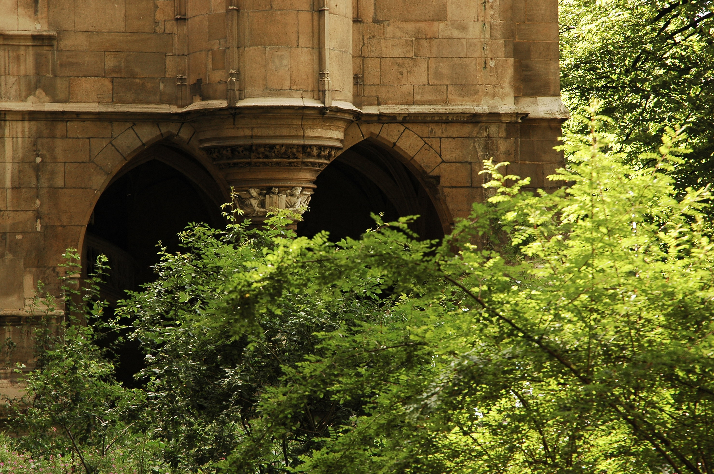 Détail de la façade nord-est, côté chapelle, de l'hôtel des abbés de cluny (musée national du moyen âge), Ve arrondissement, Paris.